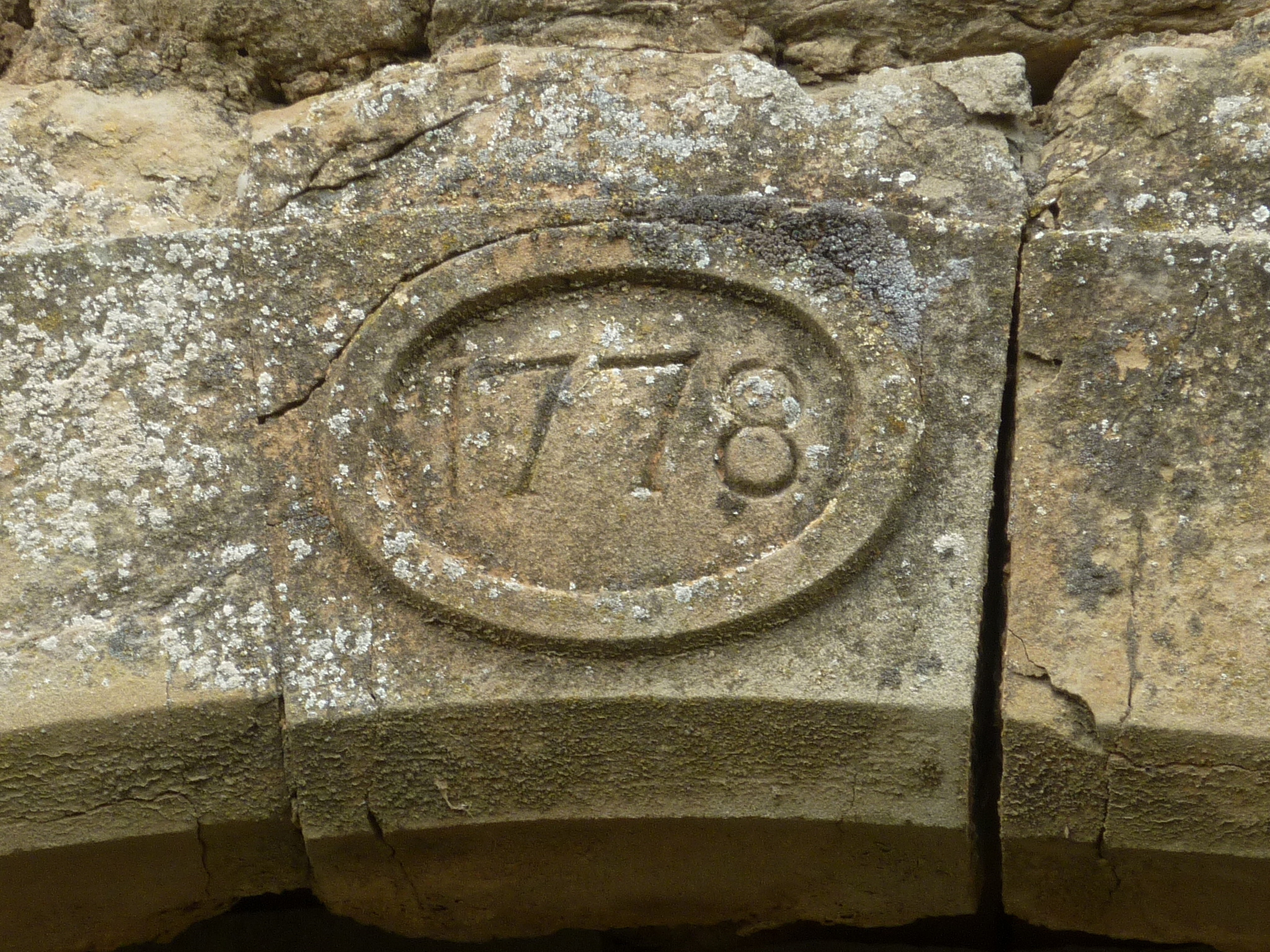 Mas Roig de Florejacs (Torrefeta i Florejacs): clau de la portada